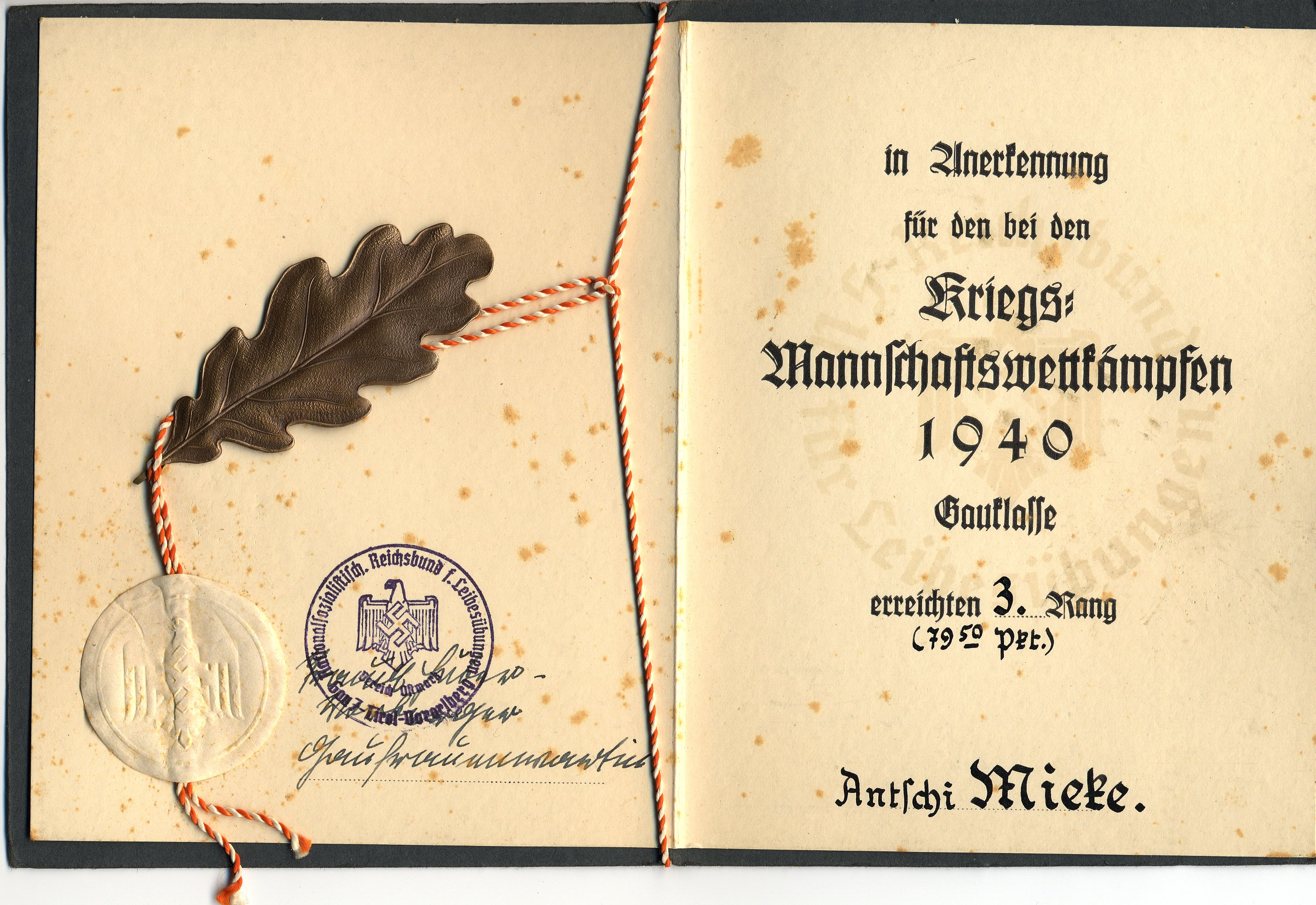 Nationalsozialistischer Reichsbund für Leibesübungen: Anerkennung für Wettkampfteilnahme der Anna ("Antschi") Mieke Das ©NSRBL-Emblem wird an vier Stellen gezeigt: außen geprägt, rechts als Wasserzeichen, links in der Stampiglie und auf dem Siegel-Kleber. Kriegs=Mannschaftswettkämpfe 1940, Gauklasse